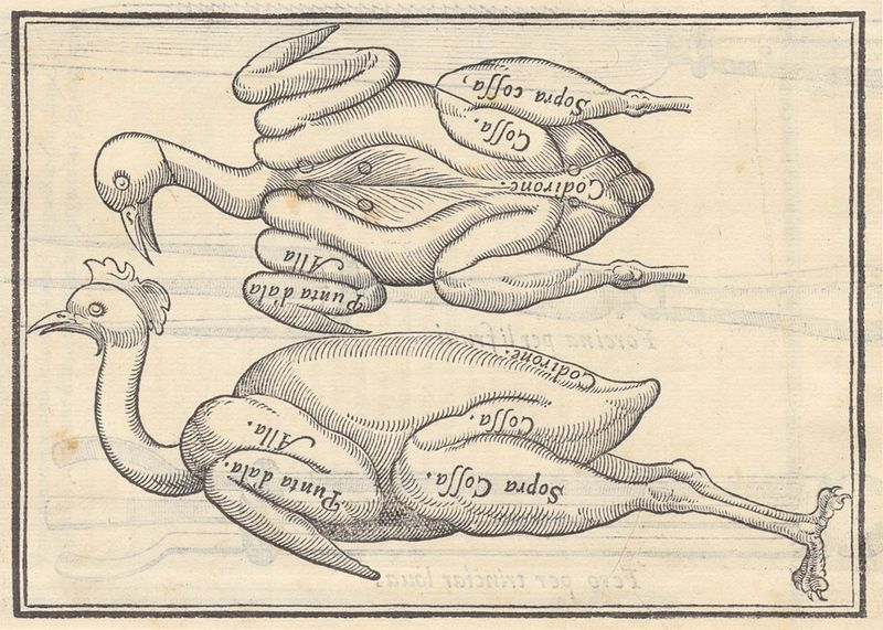 Illustrazione del libro Il Trinciante di Vincenzo Cervio rappresentando volatili con indicazioni antomiche come trinciarli